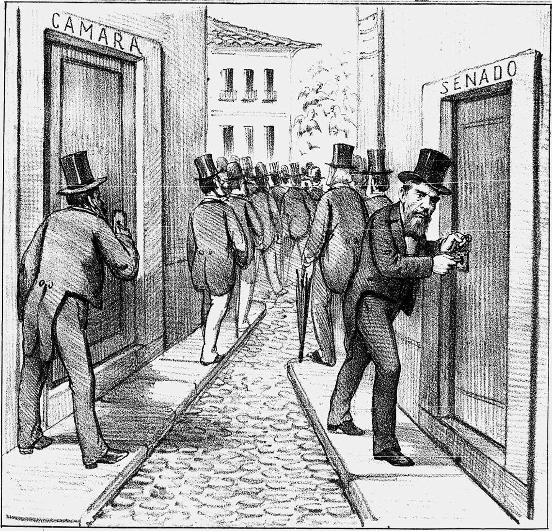 Legenda original: "Fechamento das Camaras - Au revoir."